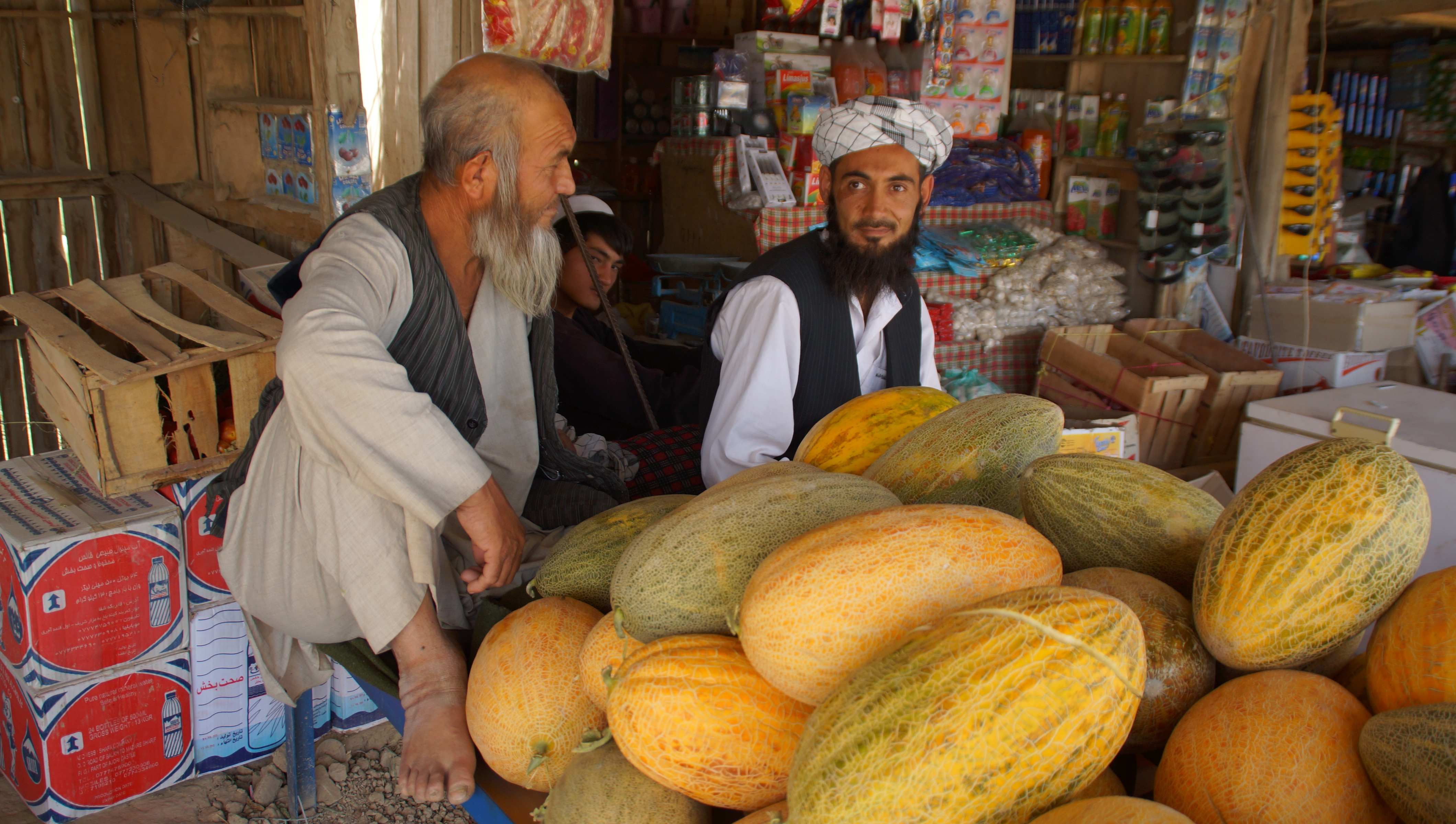 アフガニスタンのジューズジャーン州アクチャのメロン